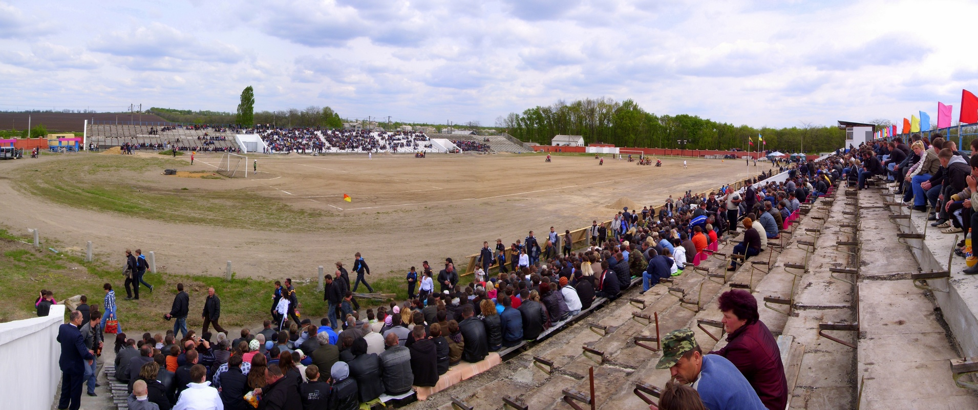 Миколаївська весна у Вікіпедії Мототрек, м. Вознесенськ, Миколаївська область